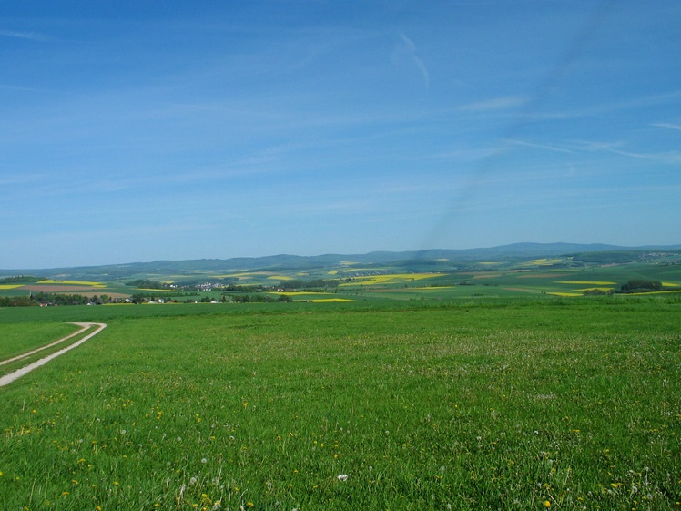 Ausblick über den Goldenen Grund zum östlichen Hinter- und Hochtaunus